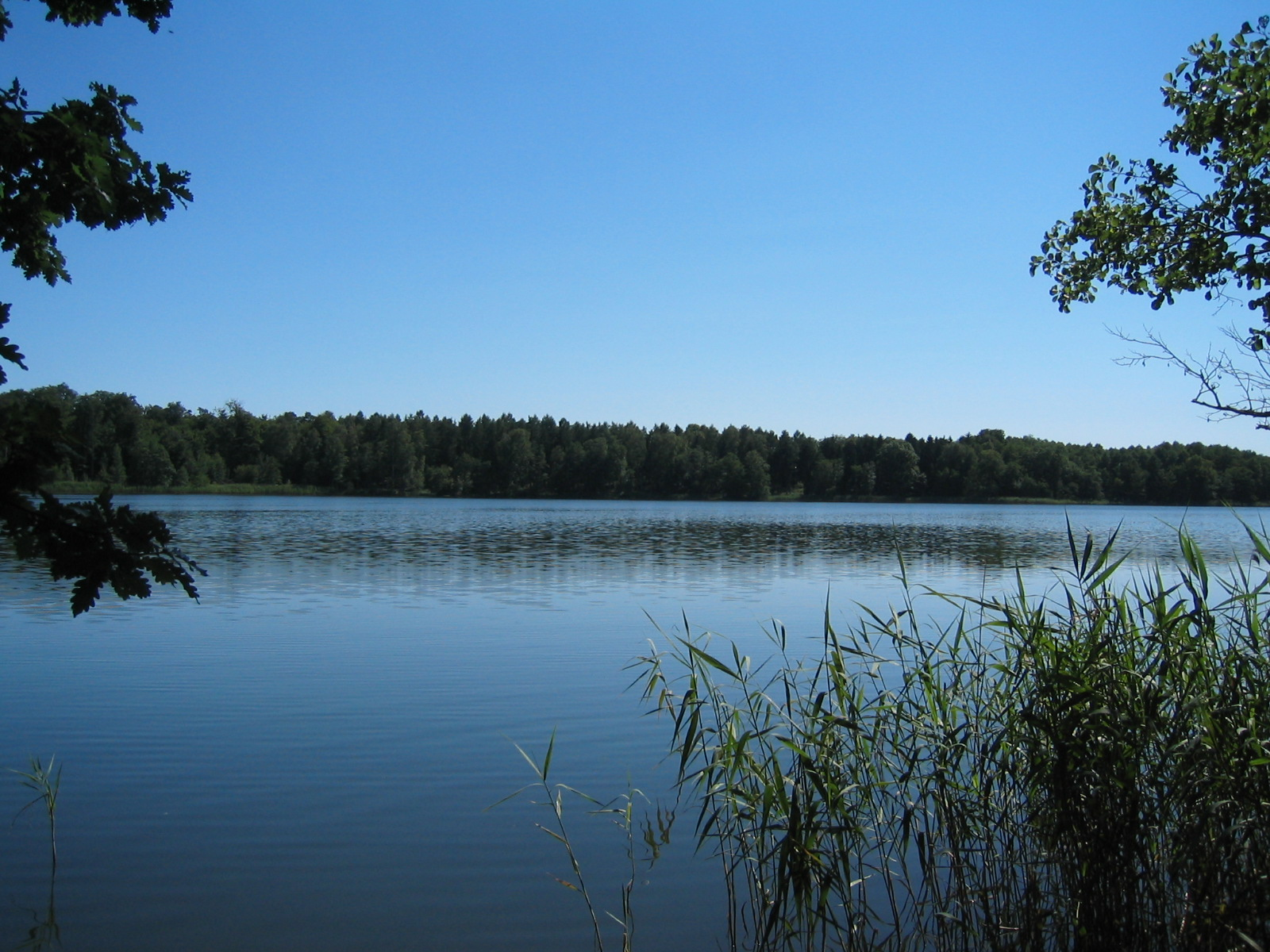 Dovinsee nordöstlich von Joachimsthal im Grumsiner Forst (NSG Grumsiner Forst/Redernswalde); Gemeindegebiet von Joachimsthal